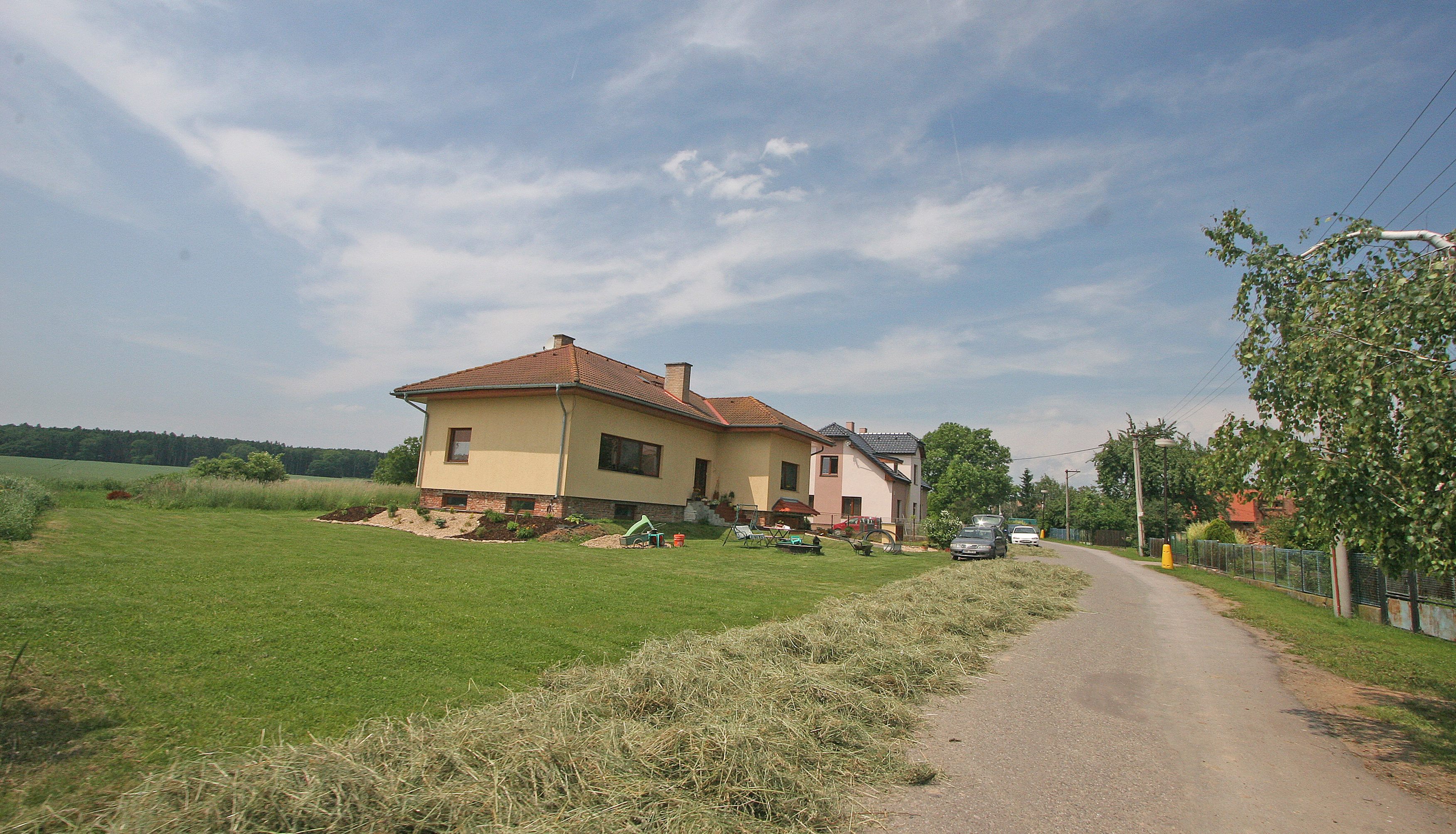 Želí čp. 24 a 25